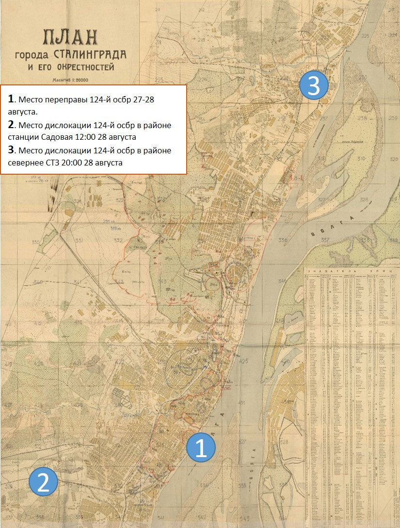 Схема перемещений 124-й осбр в период 27-28 августа 1942 года по городу Сталинграду